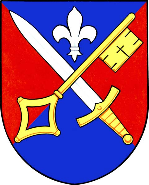 Česky: znak obce Luběnice